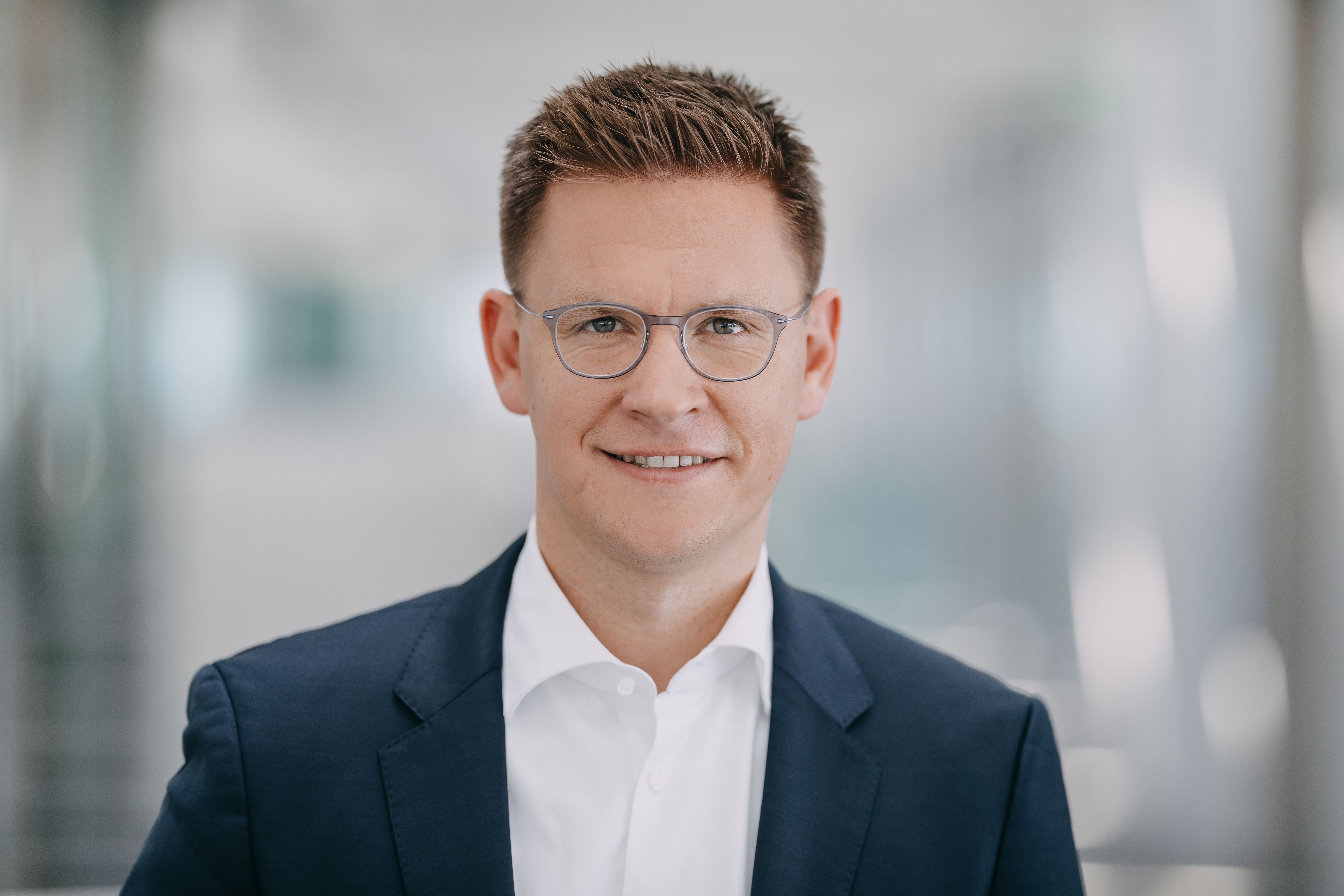 Porträt Johannes Steiniger, 2019